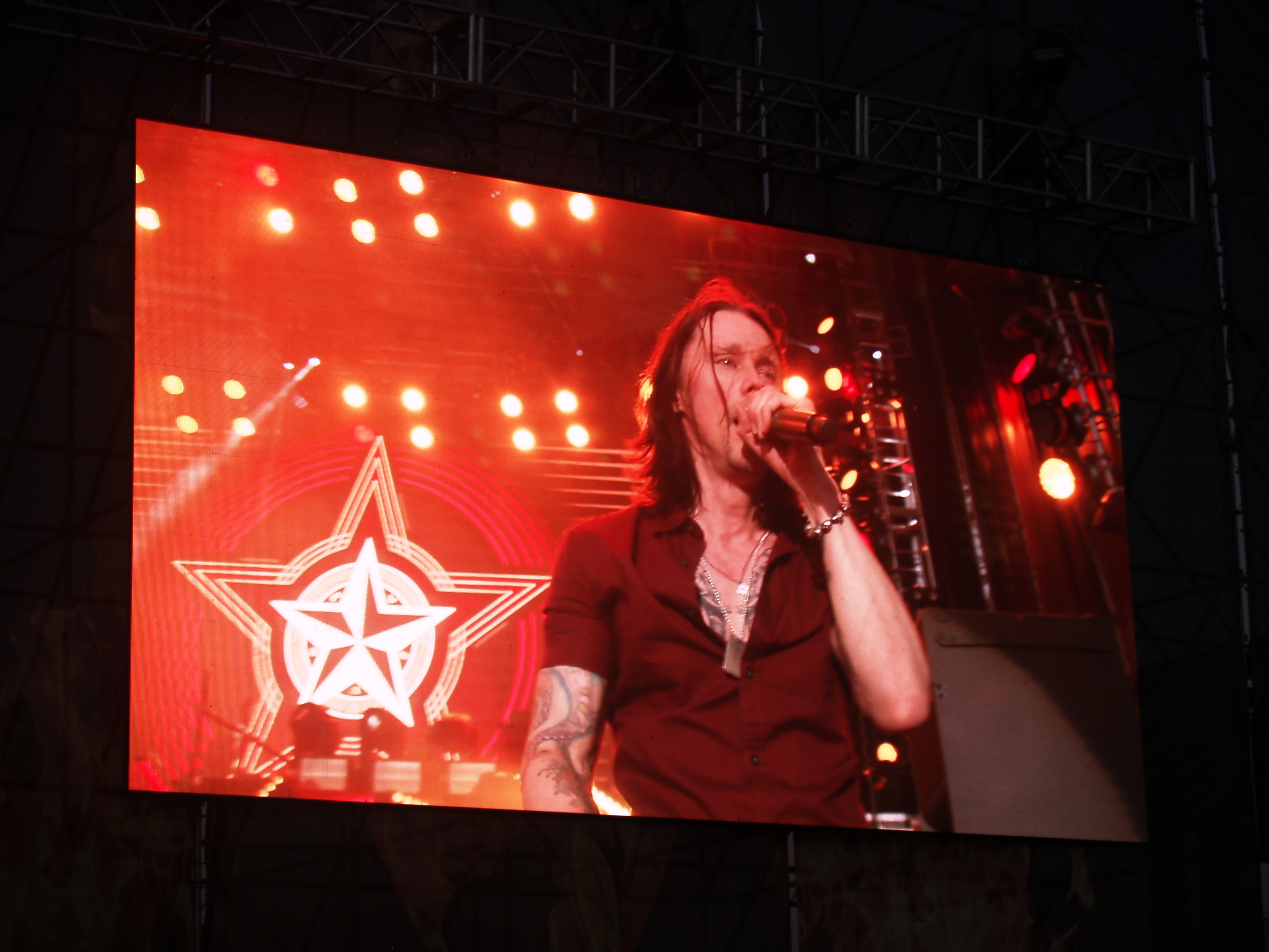 Barcelona Rock Festival 2017 - Alter Bridge